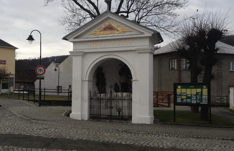 Kaple sv. Jana Nepomuckého v Hradci nad Moravicí.